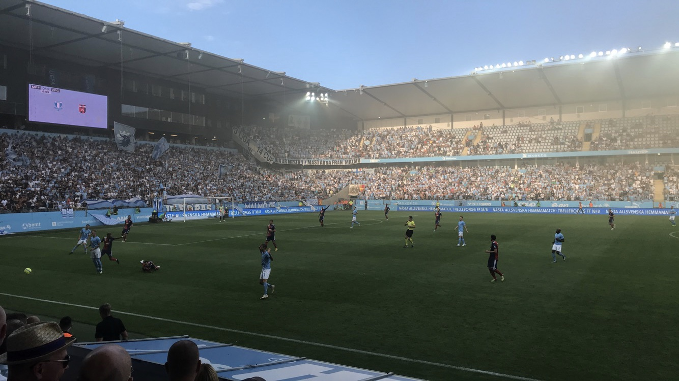 Match mellan Malmö FF och Vidi FC på Stadion i Malmö i kvalomgång 3 till Uefa Champions League 2018/19